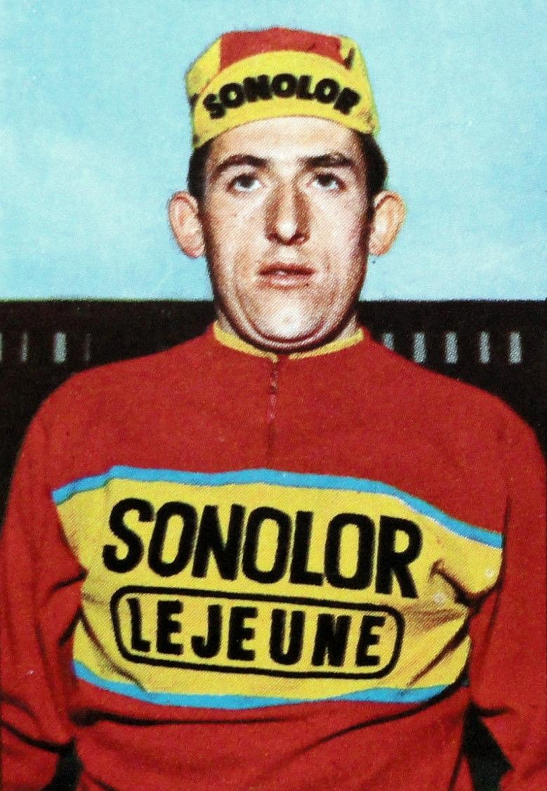 Figurina CAMPIONI DELLO SPORT 1969/70-n.208-GUYOT (FRA)-CICLISMO